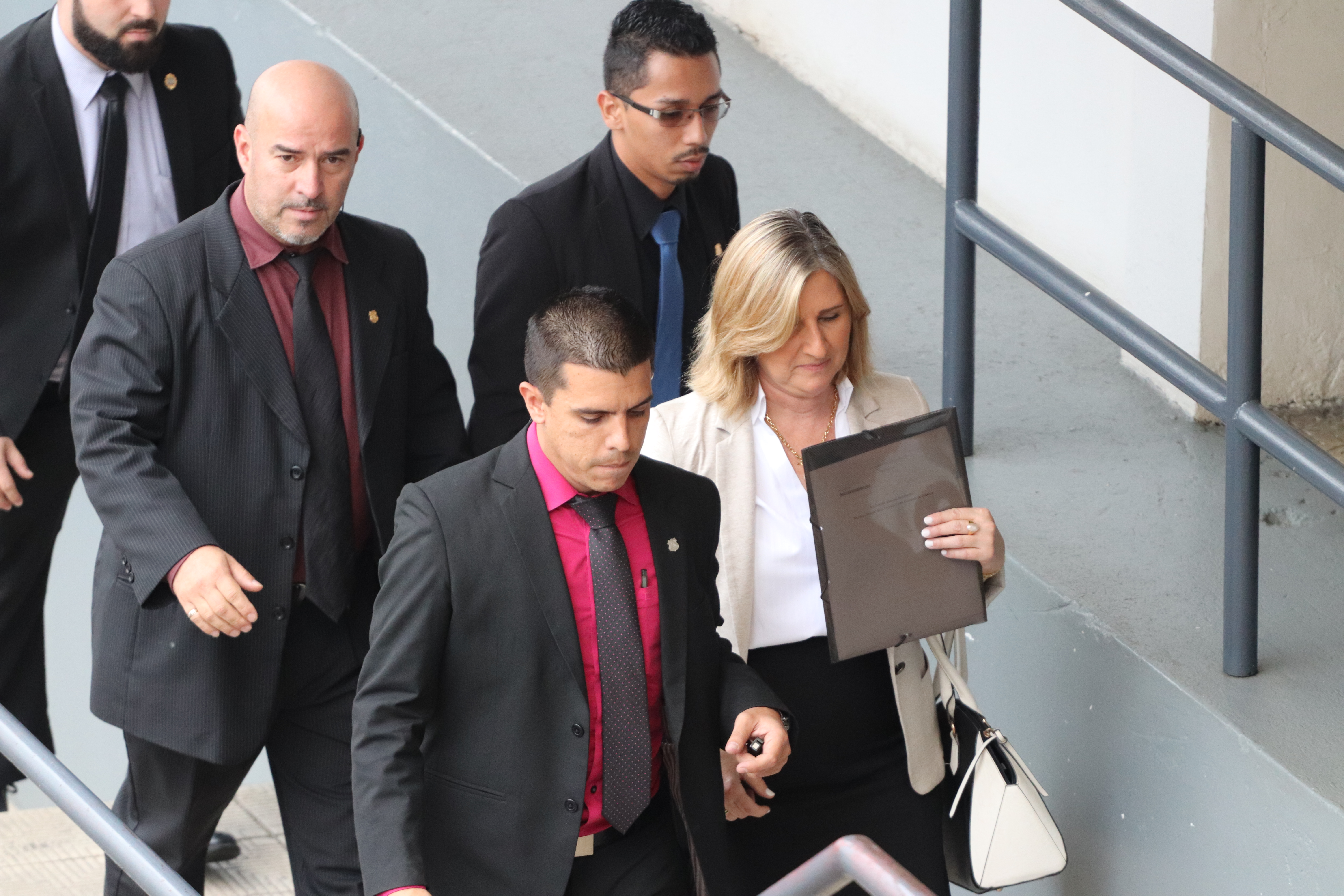 Emilia Navas Aparicio, Fiscala General de la República de Costa Rica ingresando a la Asamblea Legislativa para hacer un allanamiento